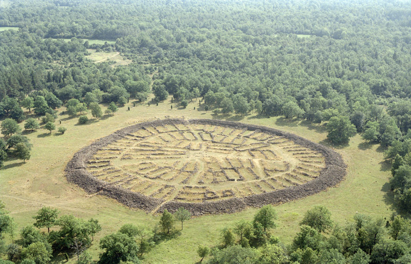 Motiv: Långlöt 30:1 Nyckelord: Flygbilder, Riksintressen Kategori: Fornborg, Skogslandskap Långlöt 30:1.